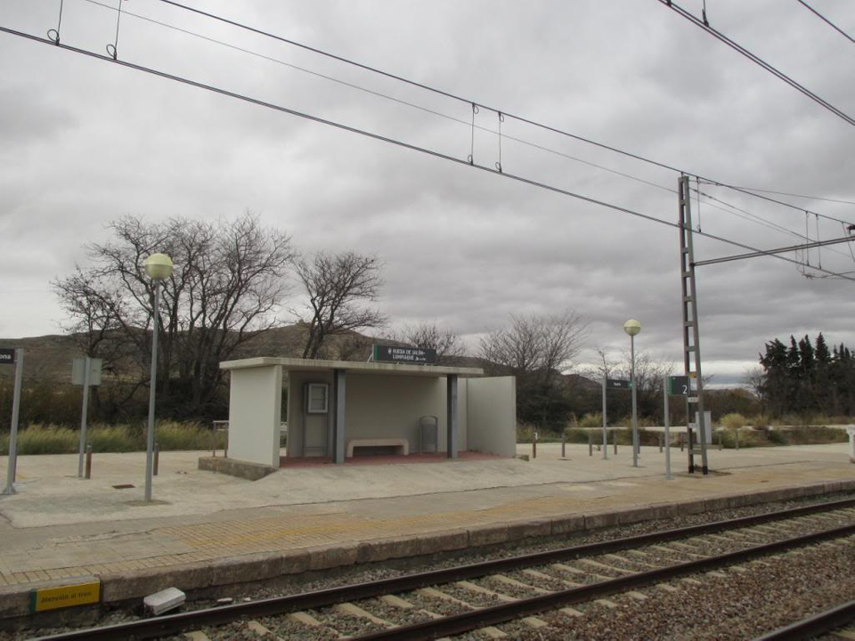 Apeadero de Rueda de Jalón-Lumpiaque después de la demolición del edificio de viajeros y la caseta de enclavamientos en 2009.